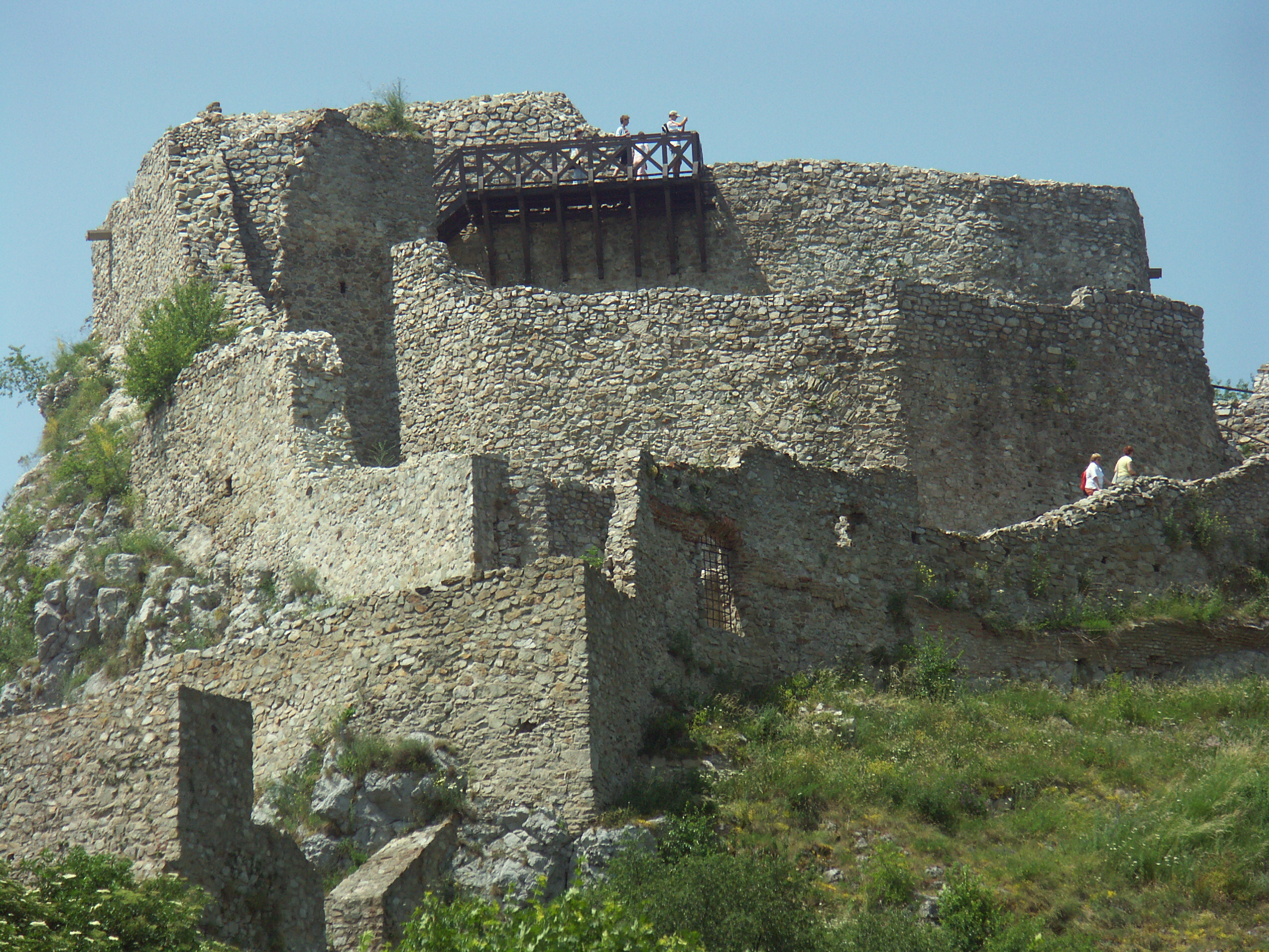 Castle Devín, Bratislava (Devín village), Slovak Republic